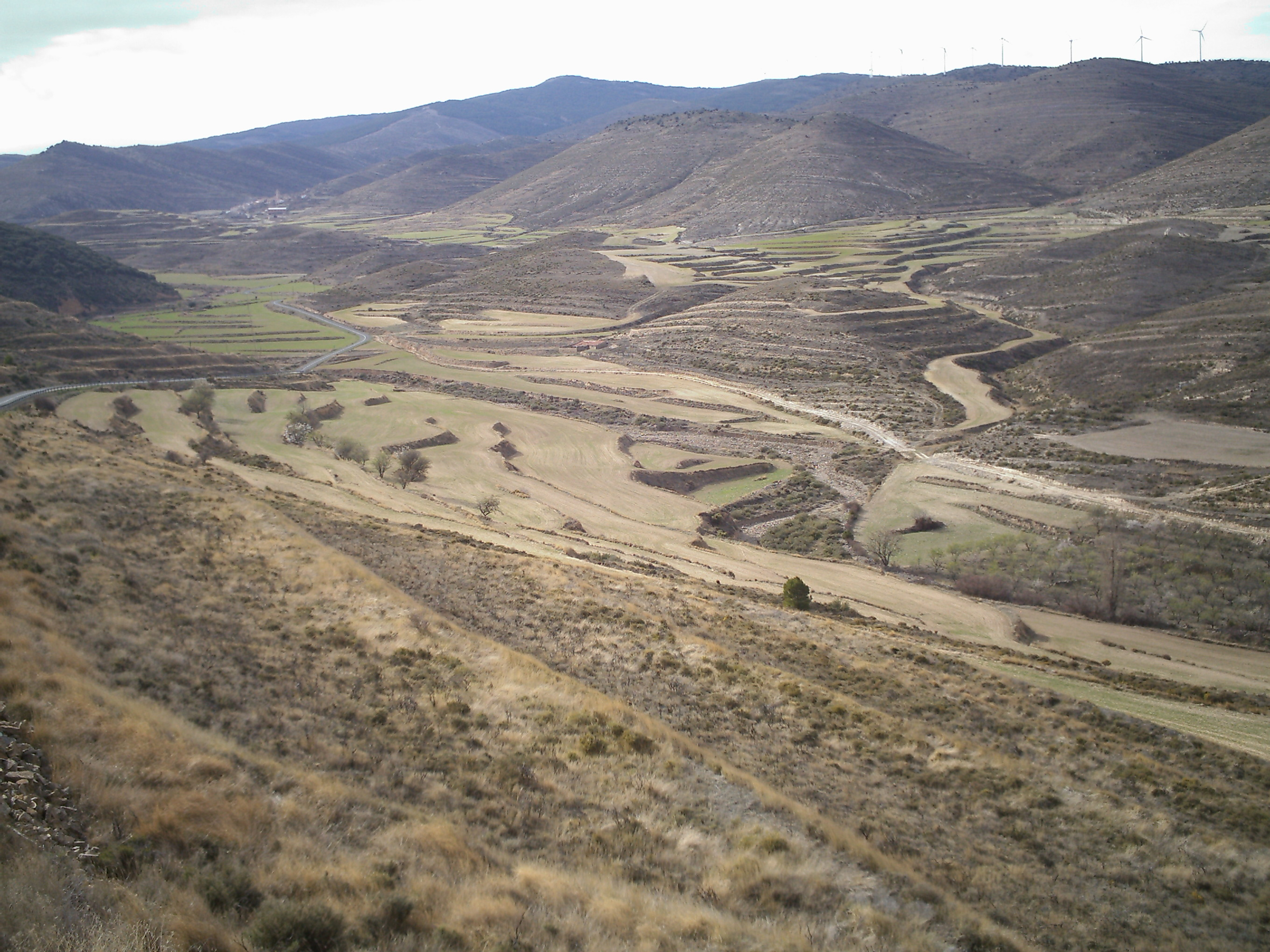 Sierra de Alcarama en La Rioja, España